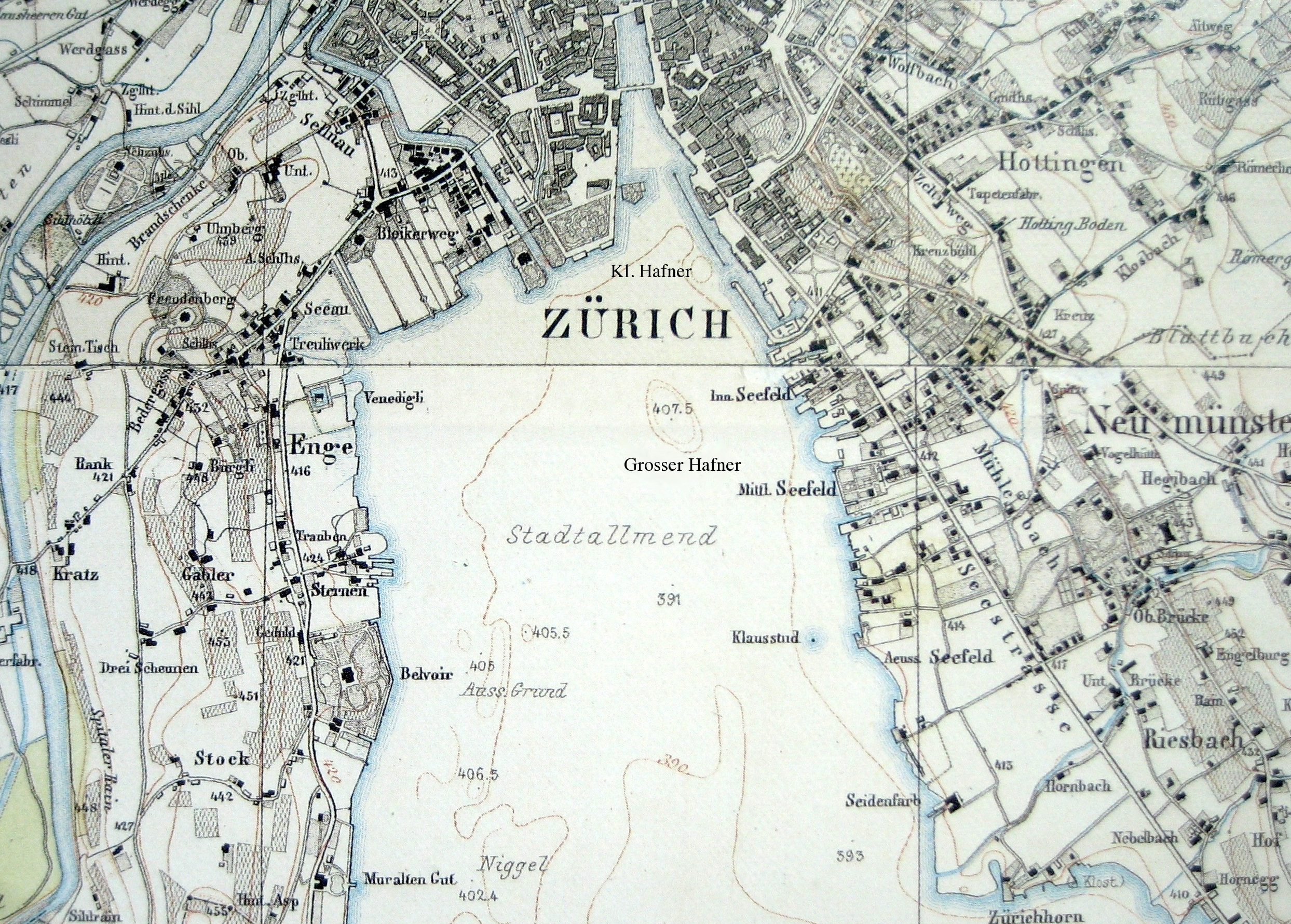 Das untere Zürichseebecken auf der Wild-Karte von 1848 (Bearbeitung einer Kopie)